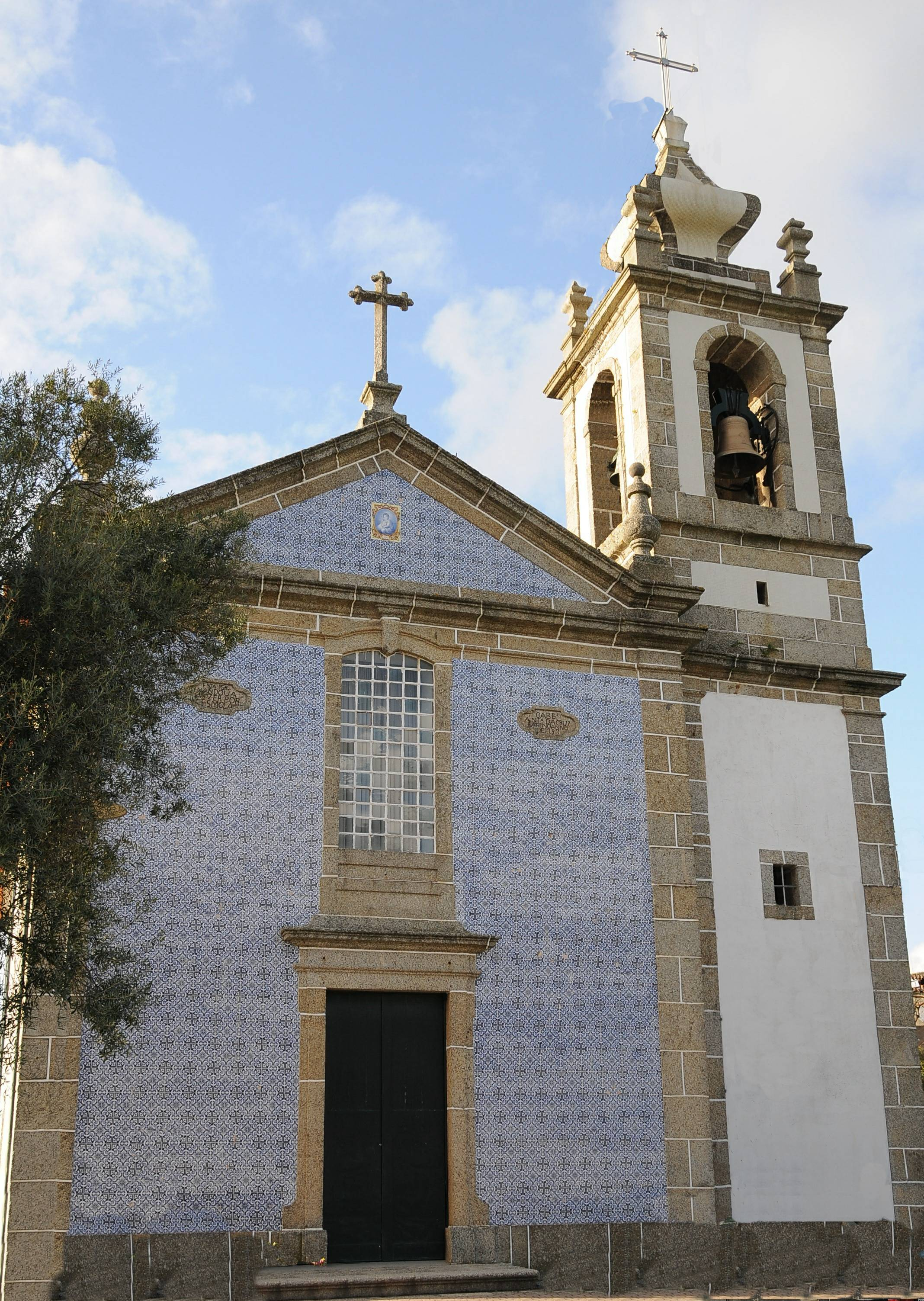 Nogueira Church, in Braga, Portugal